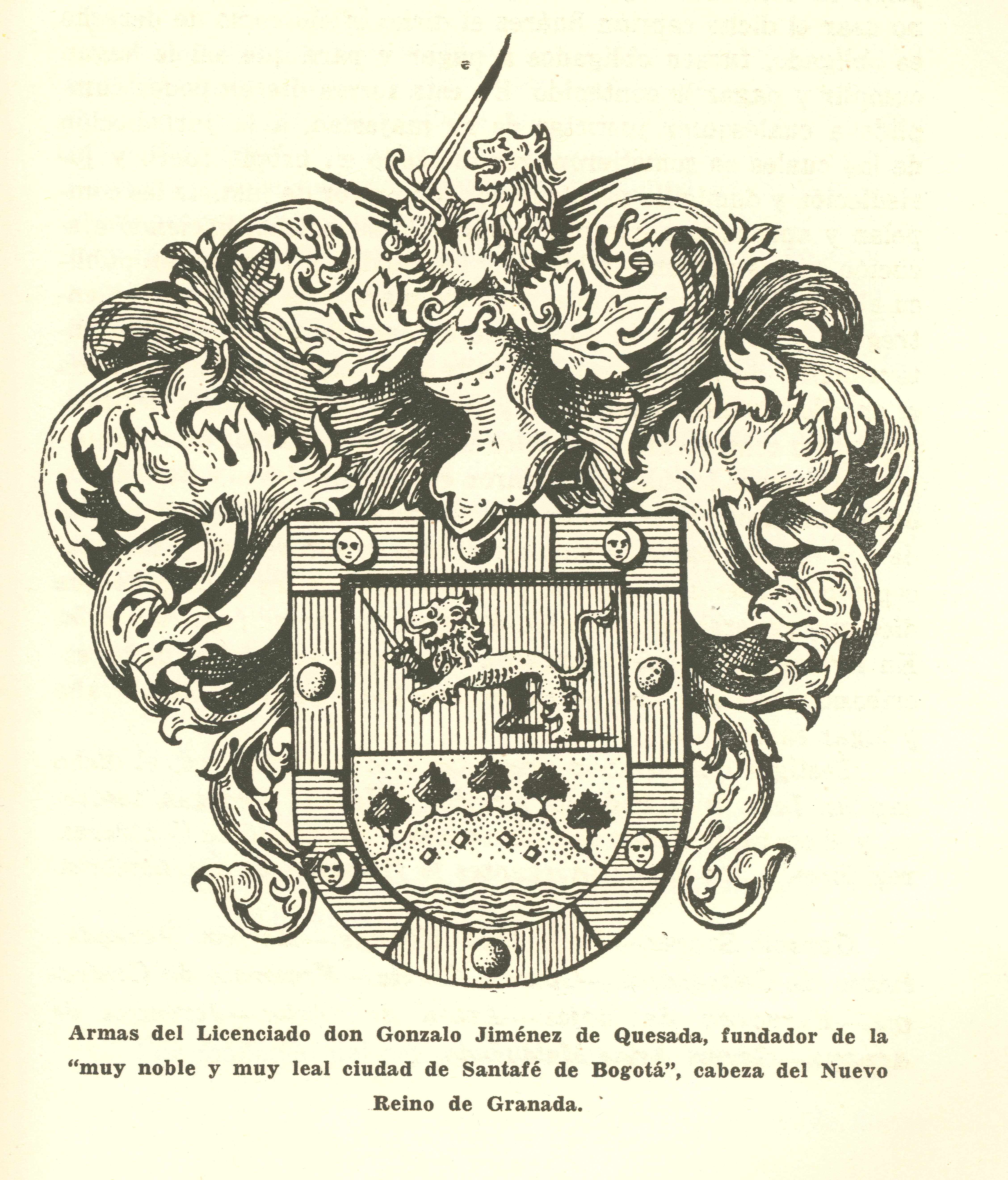 Ortega Ricaurte, Enrique. (1957).Cabildos de Santa Fe de Bogotá / Cabeza del Nuevo Reino de Granada 1538 – 1810 / Volumen XXVII – Publicación dirigida por Enrique Ortega Ricaurte Jefe del Archivo Nacional de Colombia con la colaboración de la Señorita Ana Rueda Briceño. Ministerio de Educación Nacional y Publicación del Archivo Nacional de Colombia de la Empresa Nacional de Publicaciones: Bogotá, Colombia. Año MCMLVII. Diapositiva de consulta publica hallada en los Fondos Bibliográficos del Archivo Histórico del Guayas (AHG); Guayaquil, Ecuador. Compartido y consultado por J. Javier García A.